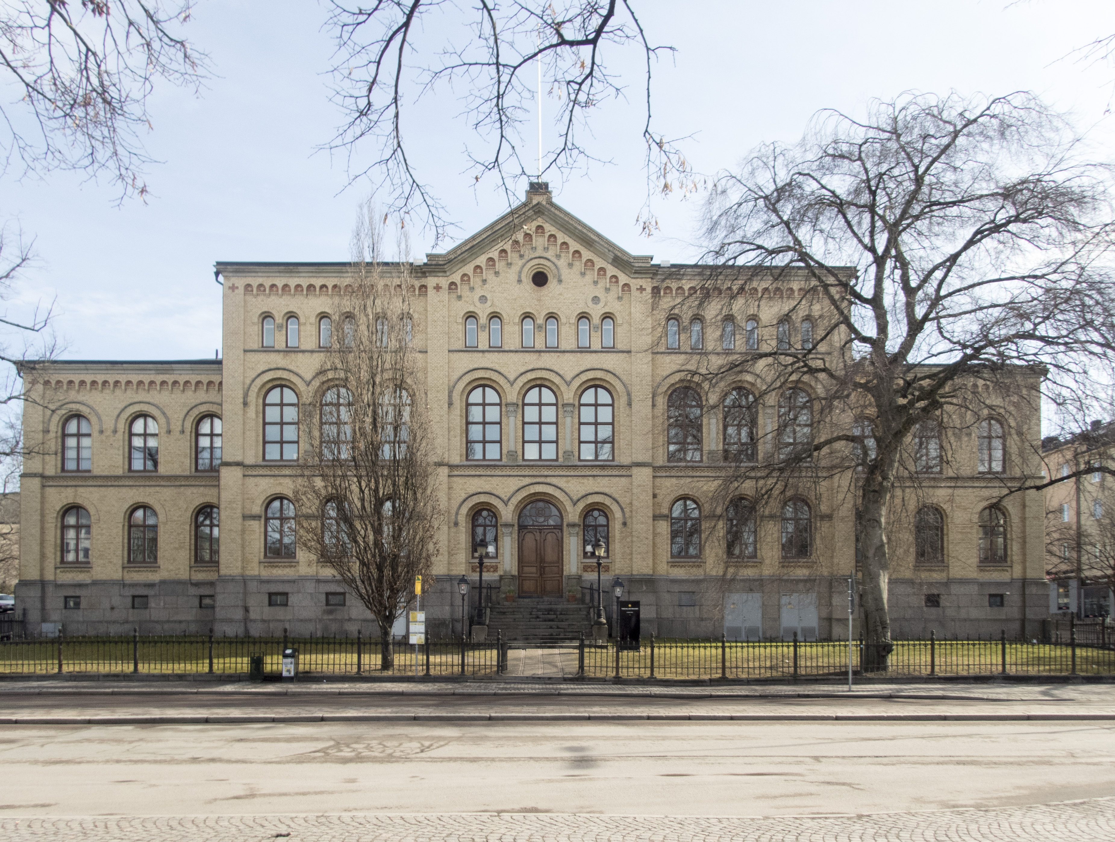 Tingvallagymnasiet, Kungsgatan 9, Tingvallagatan 6 Karlstad, Nybyggnadsår 1867 - 1869 C J Westergaard (Arkitekt), Petter Georg Sundius (Arkitekt) Lars Johansson (byggmästare)